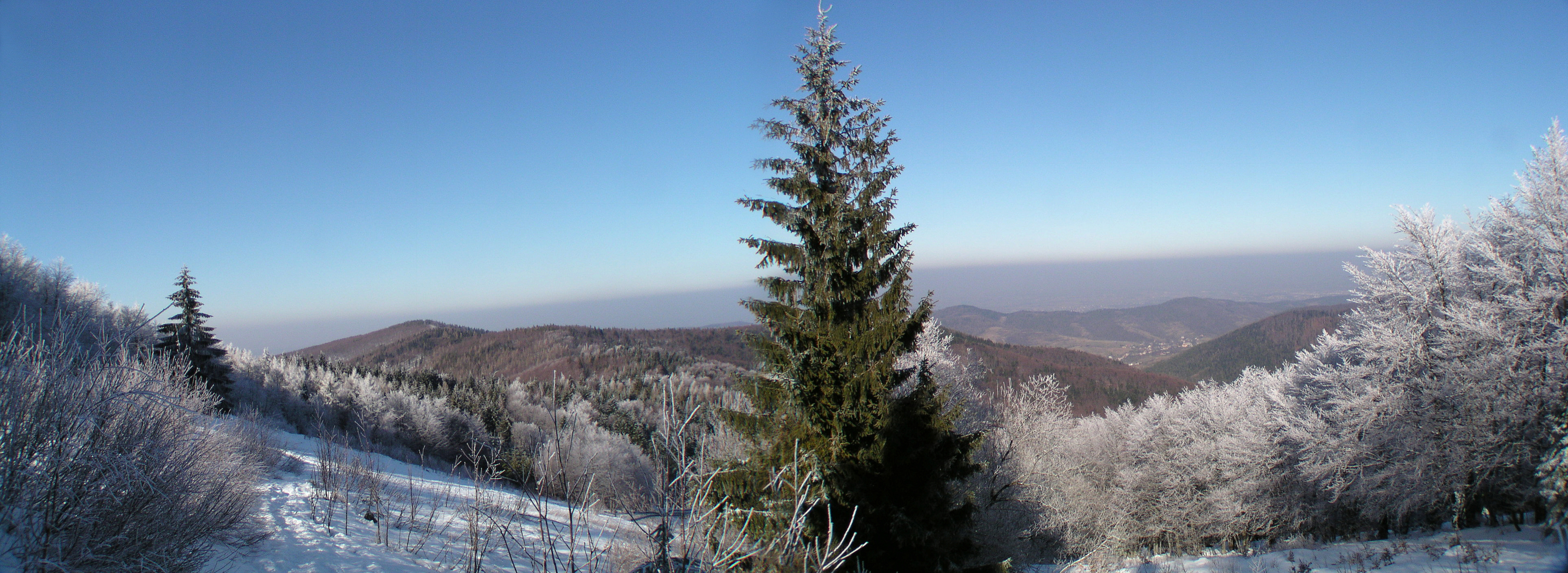 Zimowy widok z Gronia Jana Pawła II (Beskid Mały) na północ